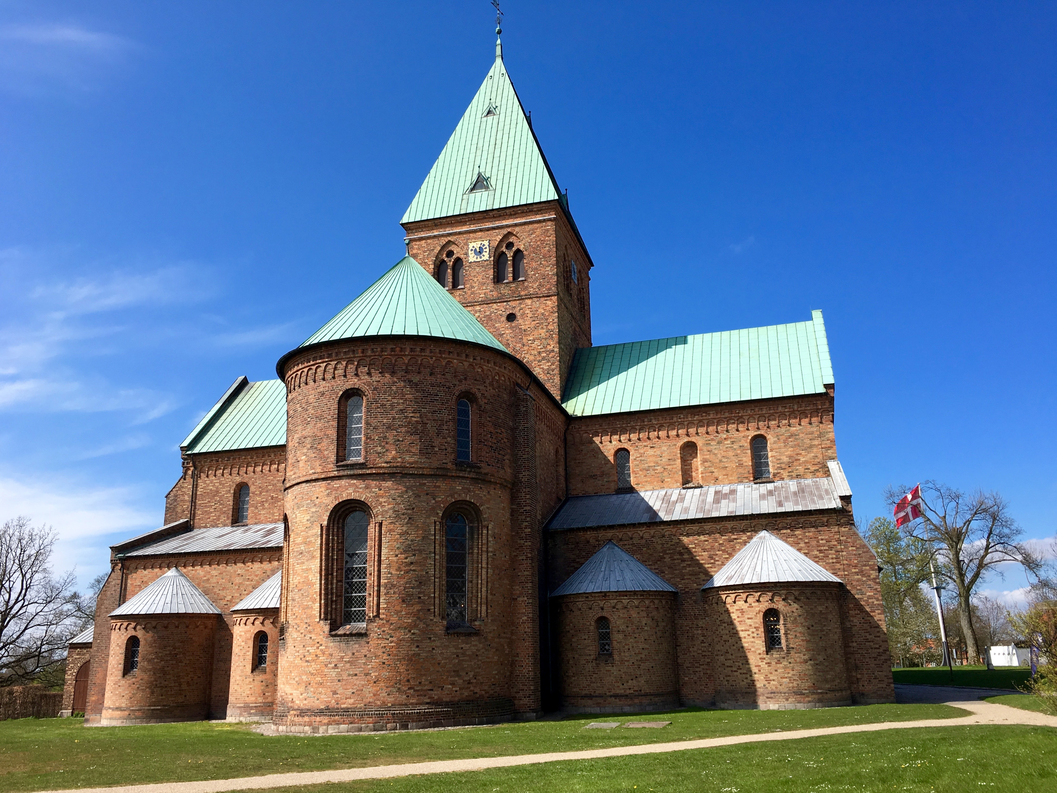 Sankt Bendts Kirke, Ringsted, Sjælland